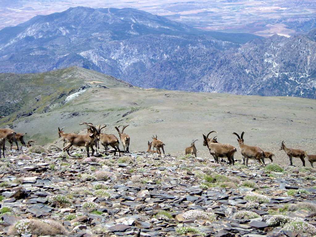 Sierra Nevada (Spain)